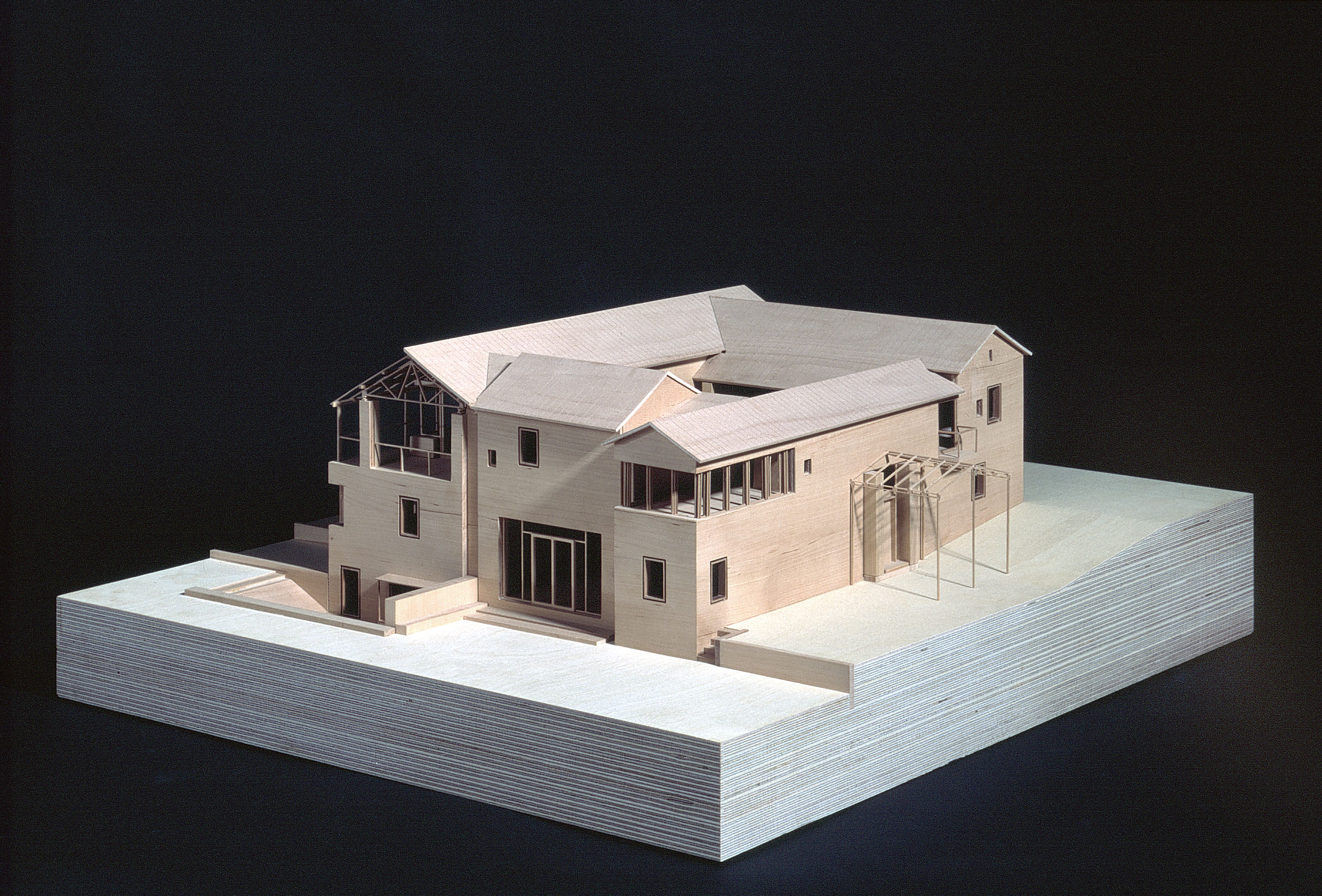 Haus Heinze-Manke. Modell TU Dortmund 1999